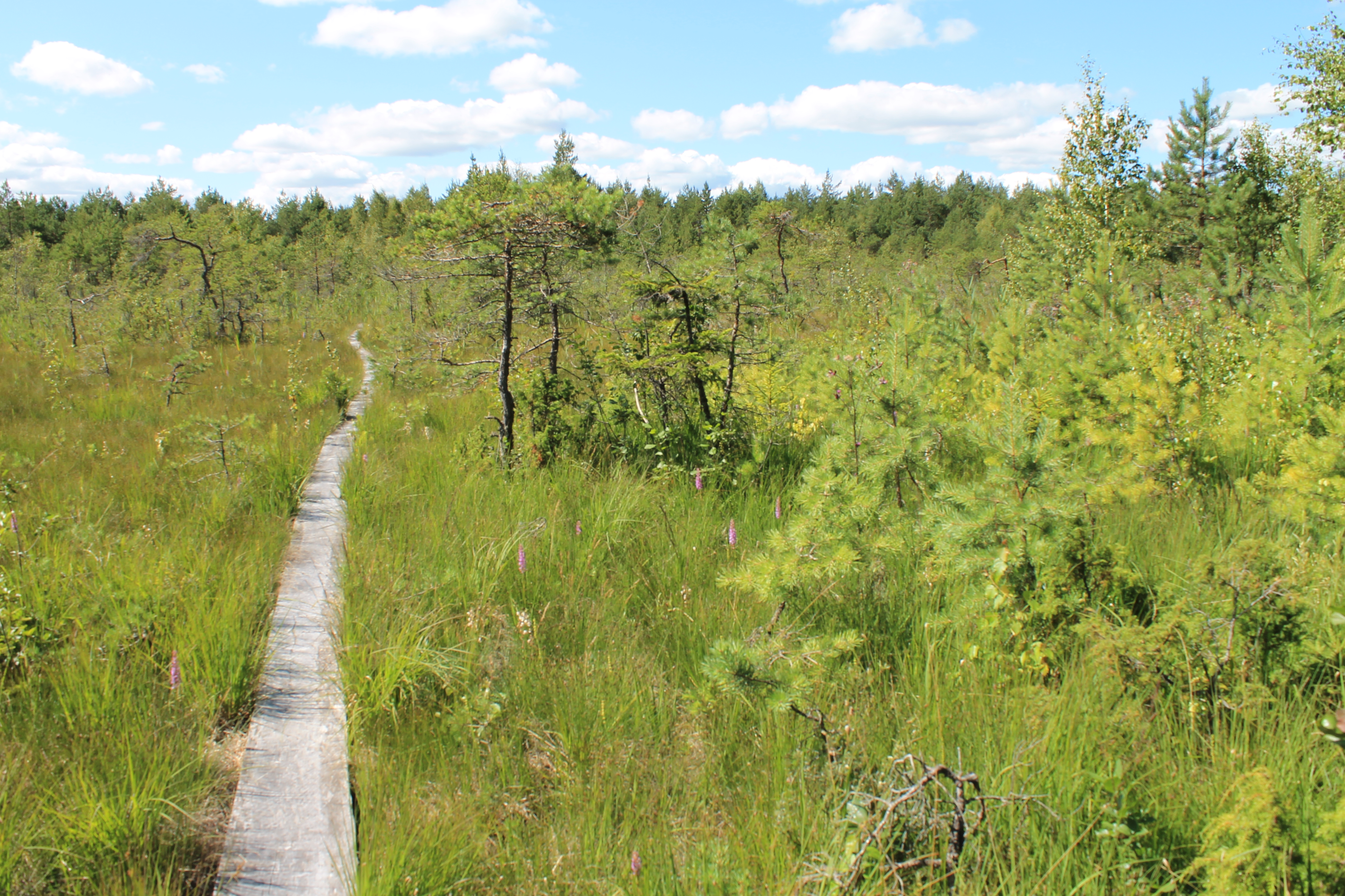 Alema talu, Nurme küla, Nissi vald, Harju maakond.